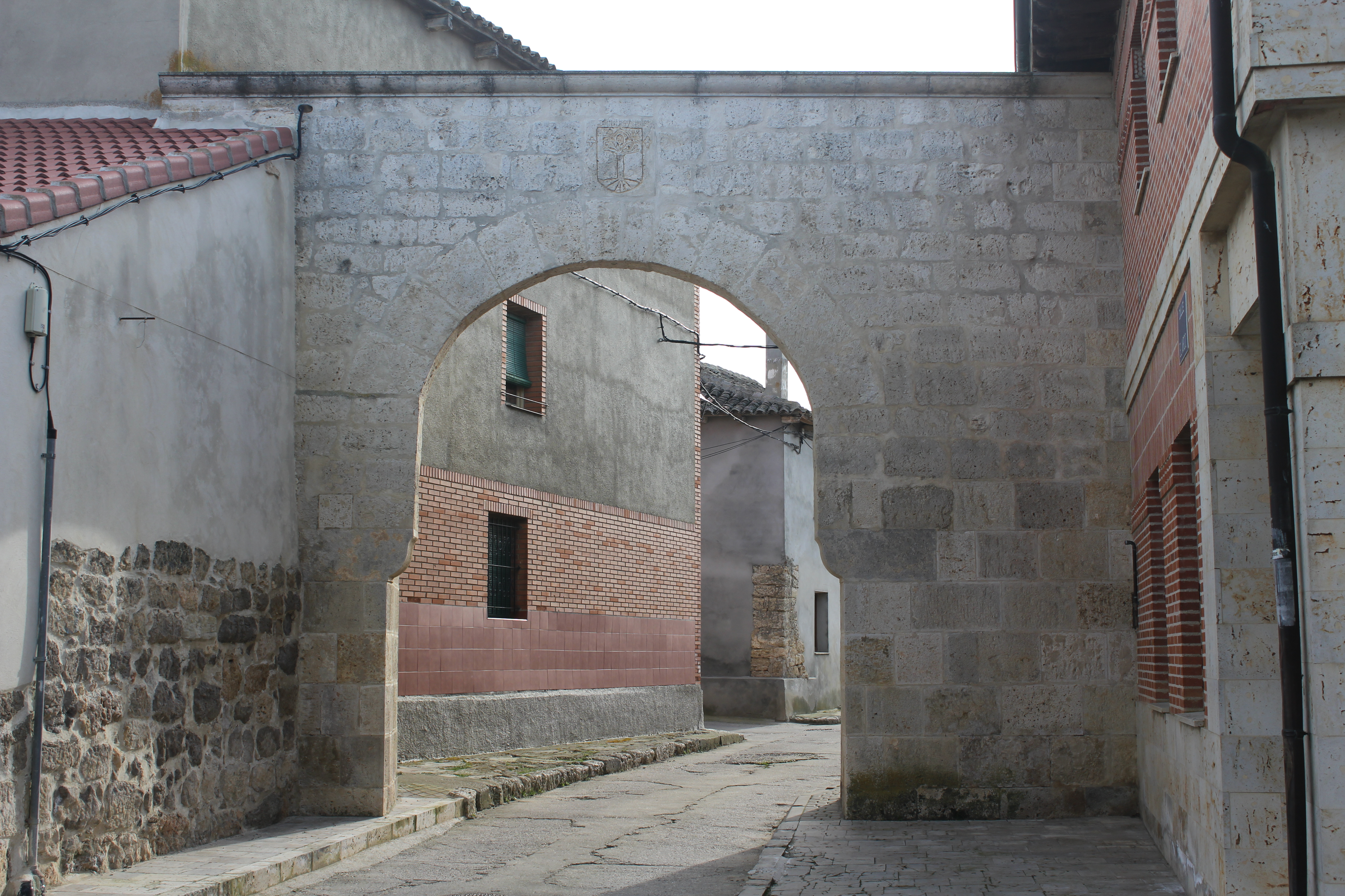 Arco de piedra junto al ayuntamiento de la localidad, resto de la muralla.